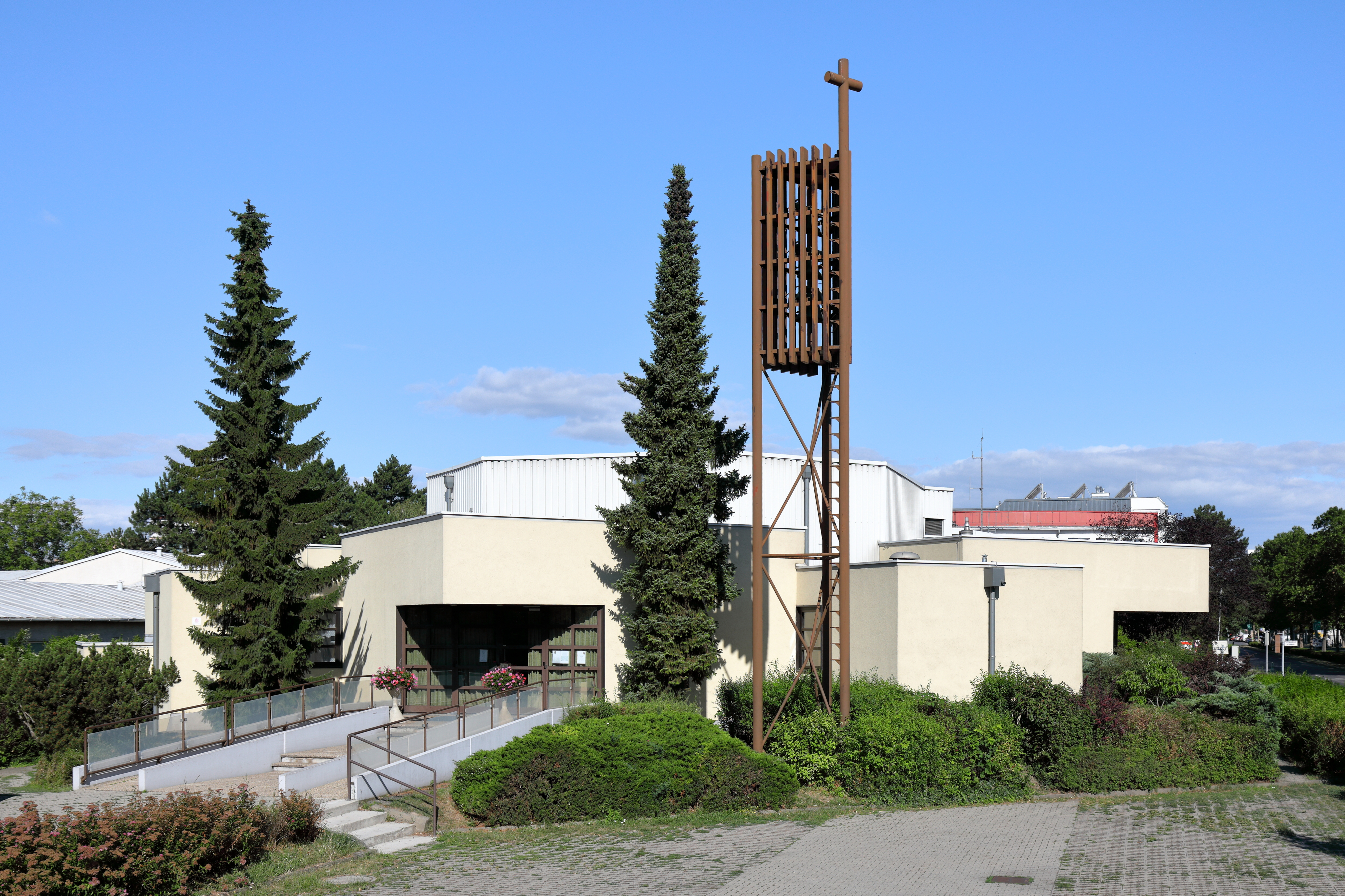 Die Filialkirche Maria, Hilfe der Christen im 22. Wiener Gemeindebezirk Donaustadt. Die Filialkirche der Pfarre Stadlau wurde ab Mai 1979 errichtet und am 23. März 1980 vom Erzbischof-Koadjutor Franz Jachym geweiht. Der teils zweigeschossige Fertigteilbau der VOEST ersetzte eine umgestaltete Militärbaracke, die am 19. Juli 1959 als Notkirche geweiht wurde.